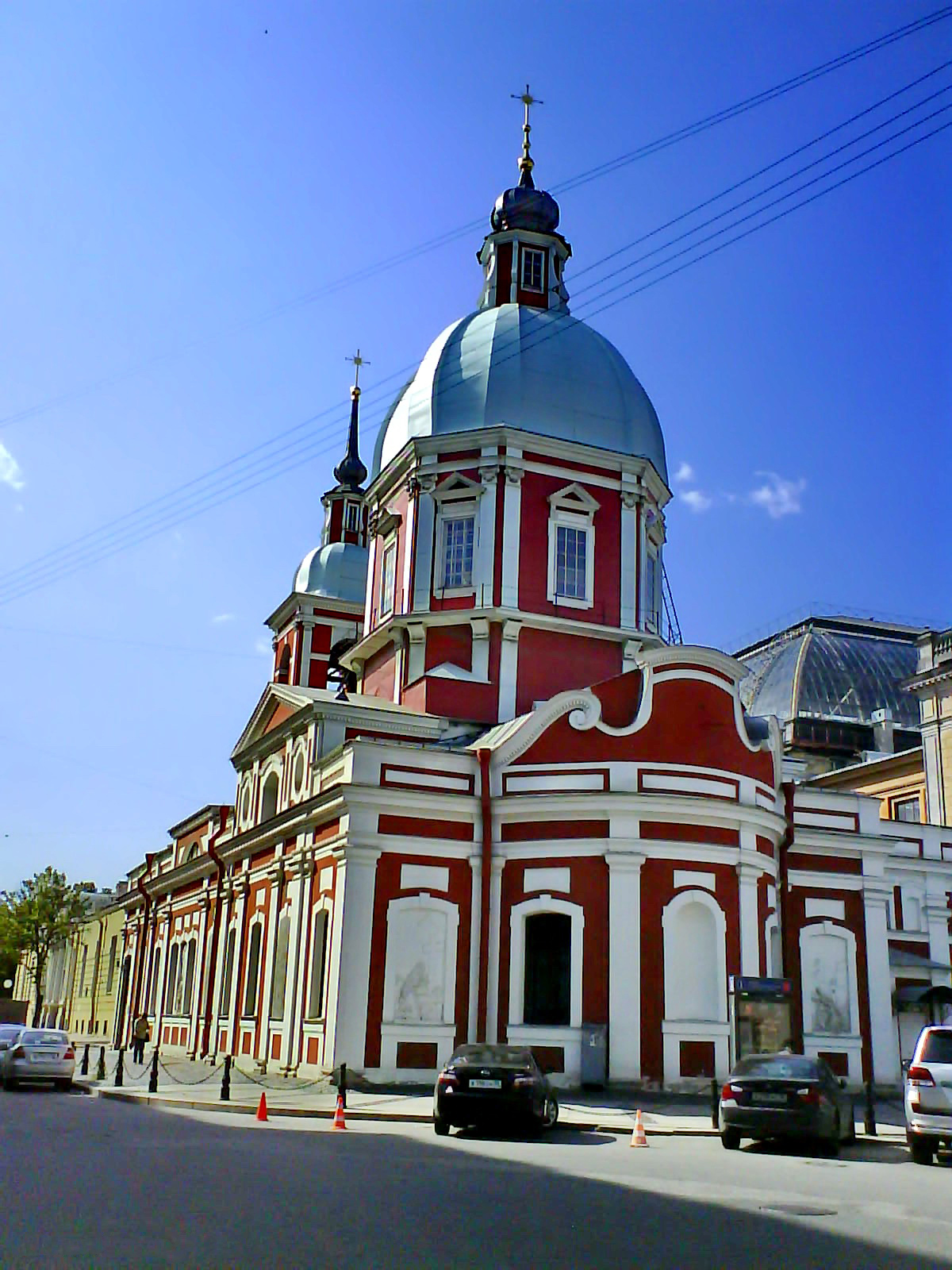 Церковь Великомученика Пантелеимона (Санкт-Петербург и Лен.область, Санкт-Петербург, Соляной переулок, 17, Пестеля улица, 2-а)